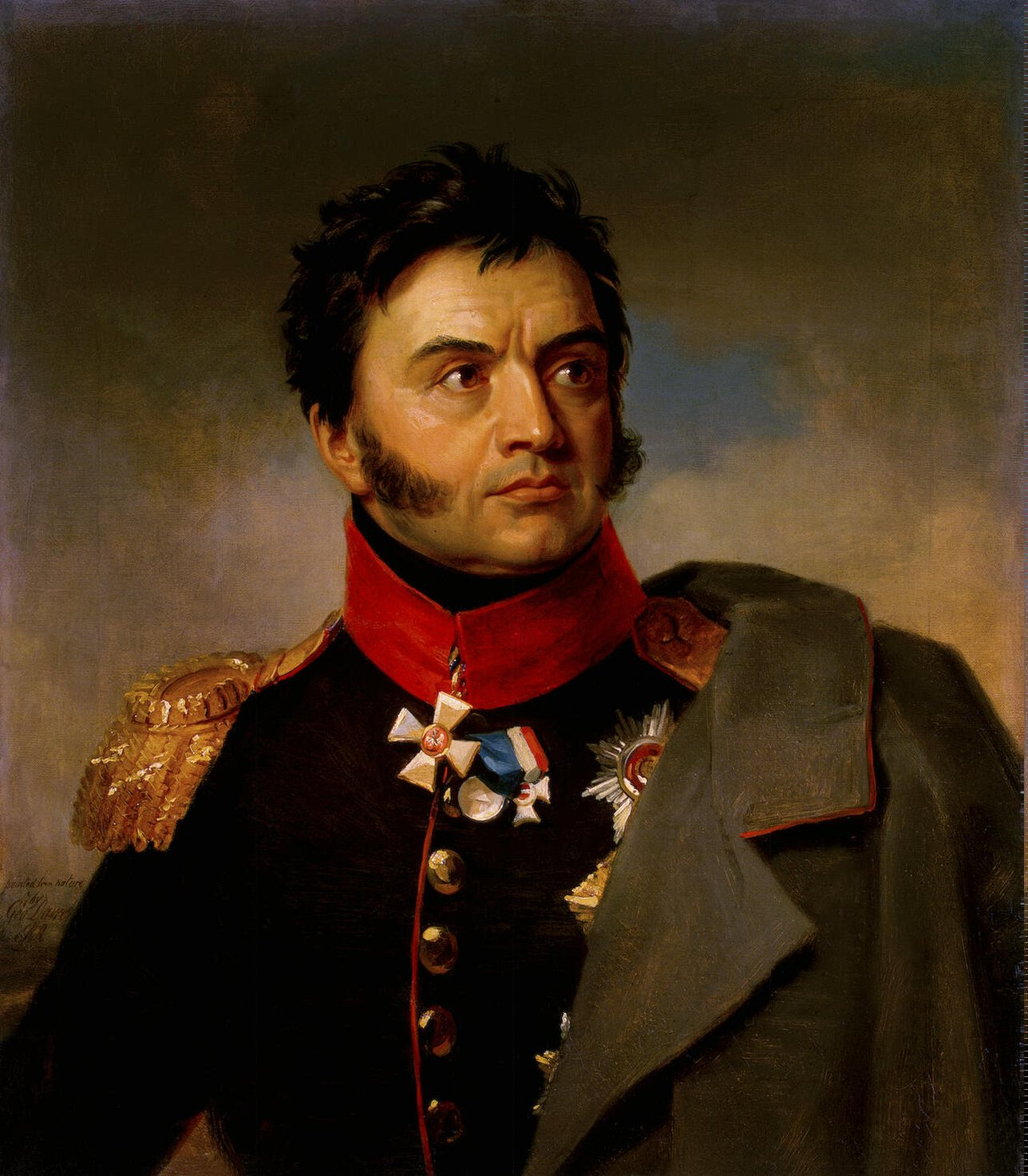 Russian general Nikolai Nikolajevitj Rajevskij (1771-1829)